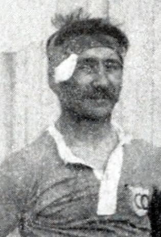 Guillaume Laterrade en 1910.